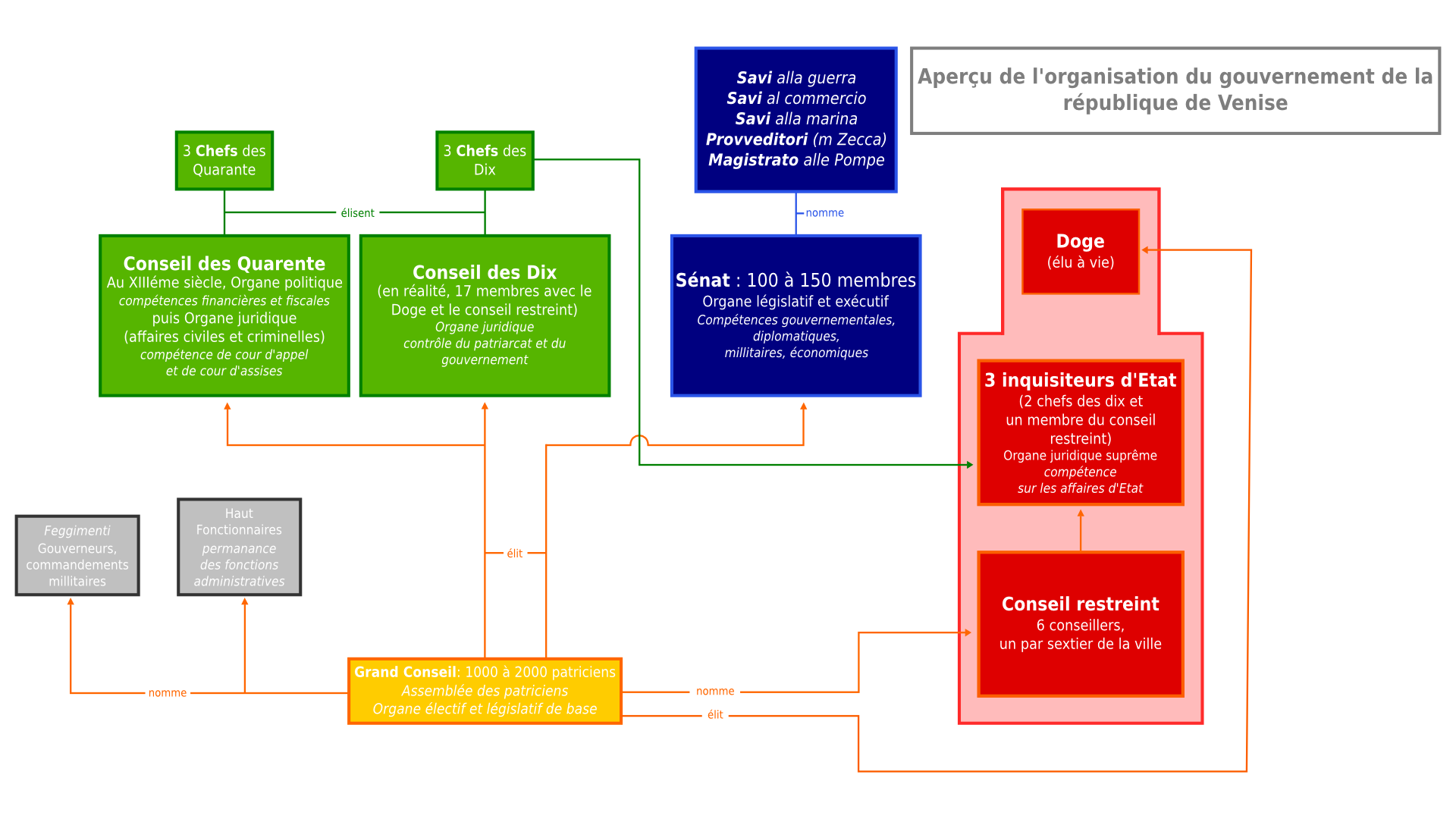 Descriptions des institutions de Venise.